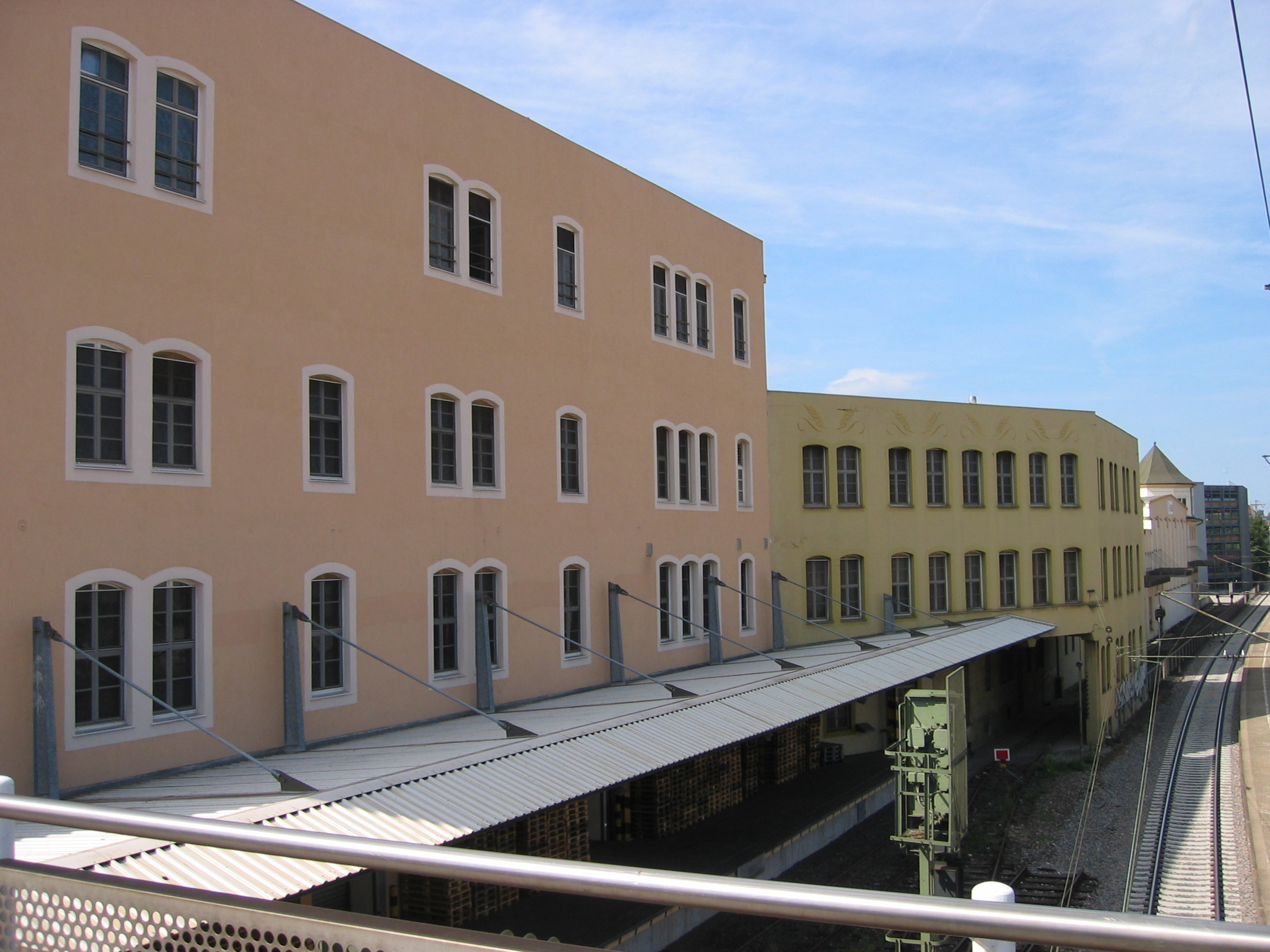 Caro-Kaffee-Fabrik am Bahnhof Ludwigsburg (Jahr 2015)